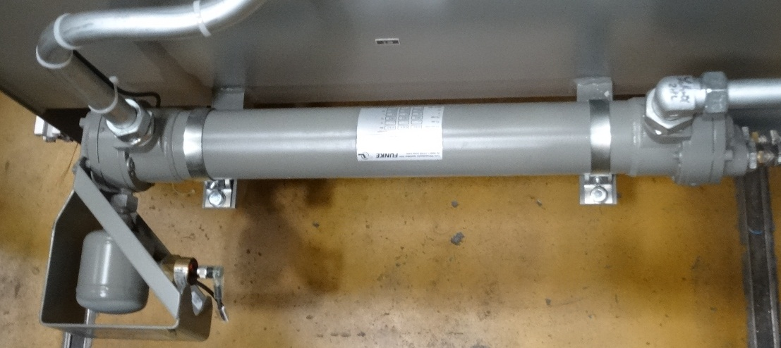 Sicherheitskühler der Fa. Funke